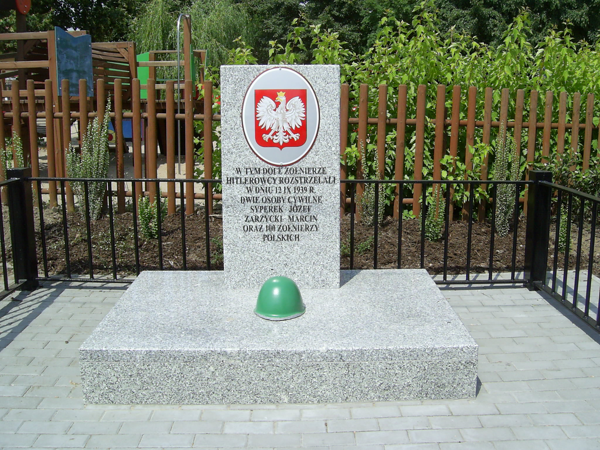 Parzniew, pomnik ku czci rozstrzelanych przez hitlerowców 12 IX 1939 - odnowiony w 2009